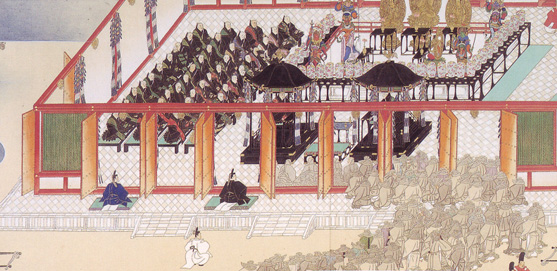 Rouleau 11 section 2 : cérémonie religieuse Yiuma-e présidée par le moine Egyô dans la Salle de lecture du Kôfuku-ji.